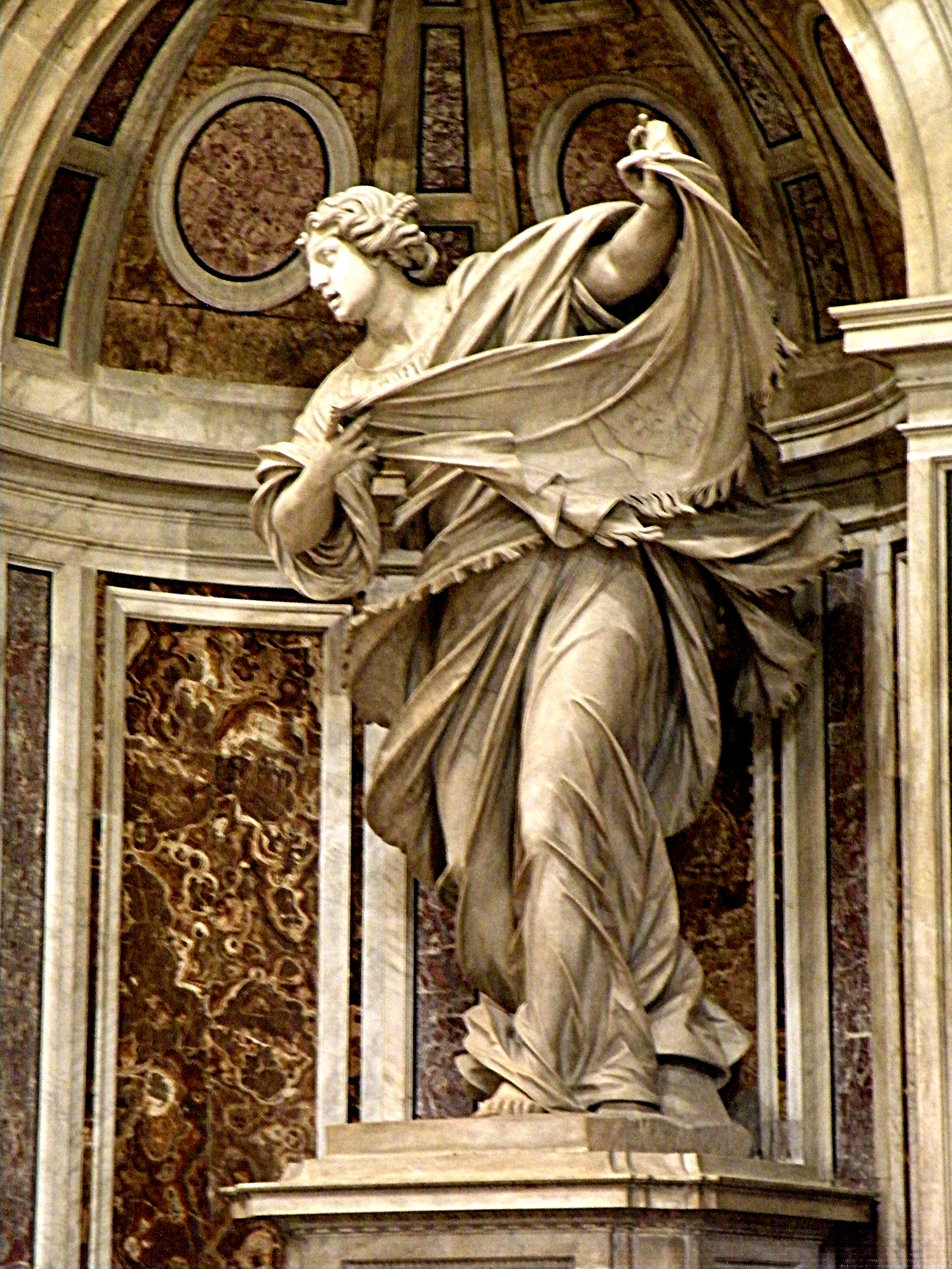 Собор Св.Петра.Св.Вероника.